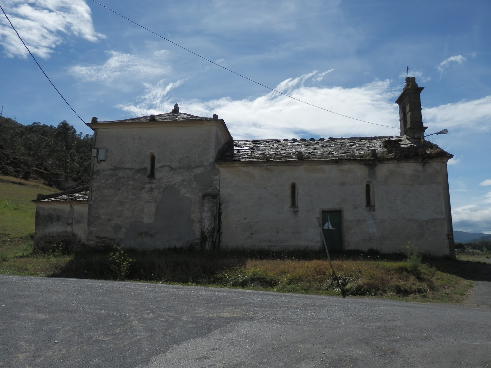 Capela no lugar de San Pedro, Santiago de Mondoñedo, Mondoñedo, España